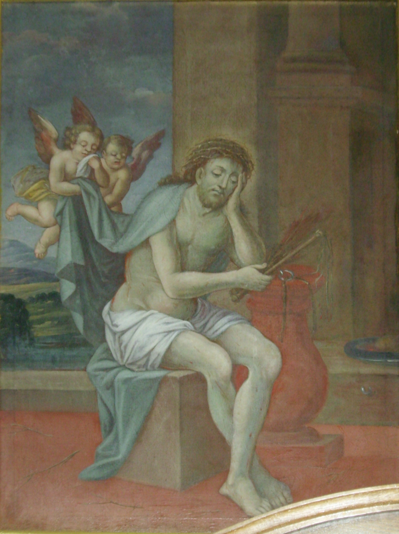 Gemälde an der Westwand des Nordarmes der Heilig Kreuz Kirche Mindelaltheim